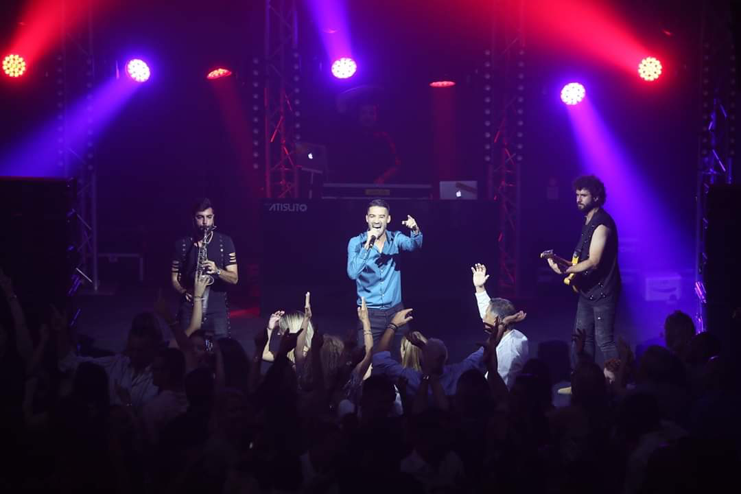 הזמר עידן חיים בהופעה